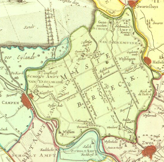 Locatie: Mastenbroek (ged) (gem Hasselt), O, ; Beschrijving van de voorstelling: "Nieuwe en Naauwkeurige Kaart van Overijssel". Detail uit een 18de eeuwse kaart van Overijssel, de Mastenbroeker polder. Algemene gegevens: Trefwoorden:Kaarten;Collectie Stedelijk Museum Zwolle;Mastenbroek, polder; Literatuur: Auteursrechthouder:Stedelijk Museum Zwolle, Melkmarkt 41, Postbus 1130, 8001 BC, Zwolle, O;. Documentidentificatienummer:DIA03851-C051 1 dia van kaart : kleur